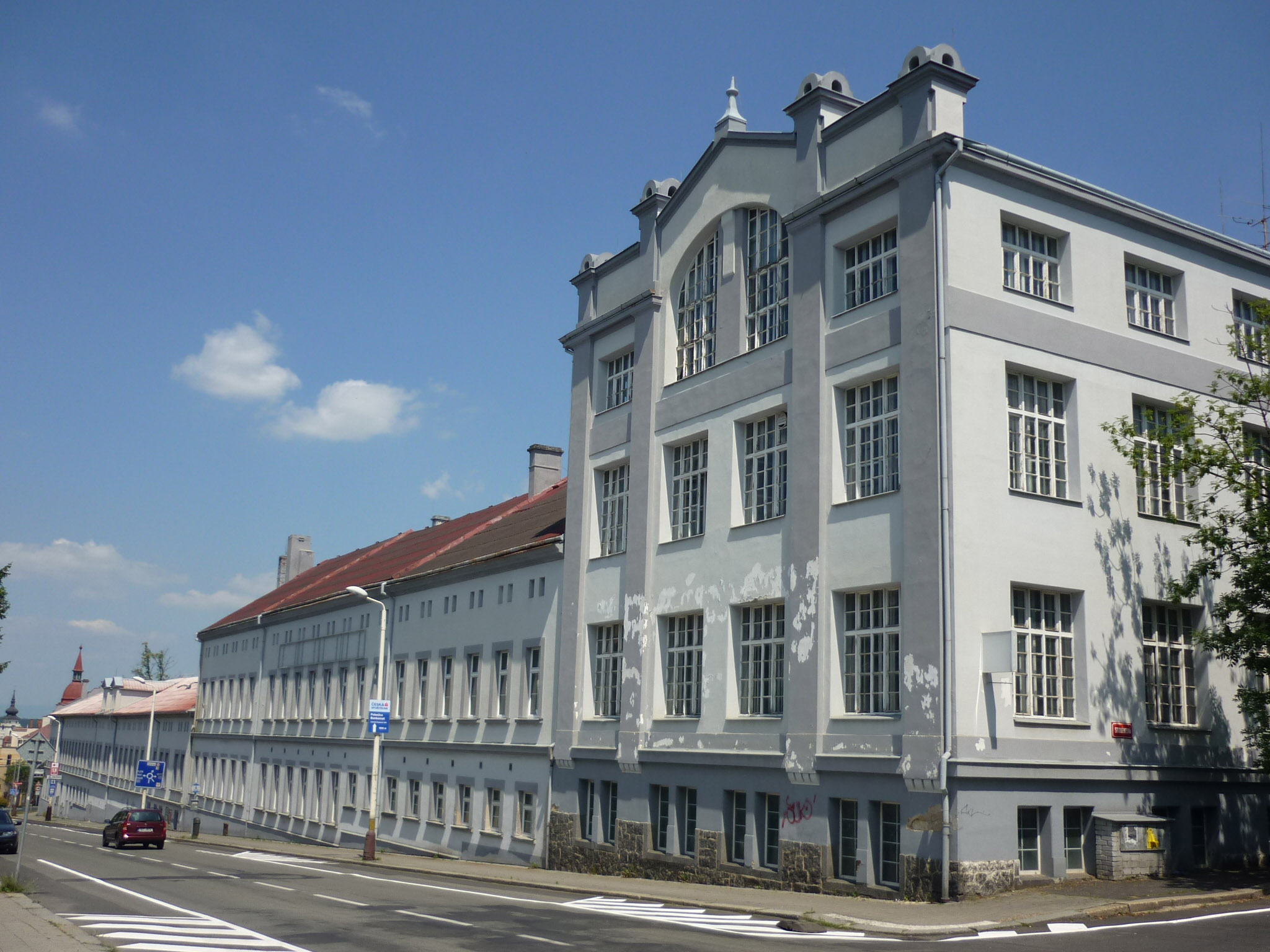 Ehem. Kartonagenfabrik Lüdersdorf in Saaz, Holletitzer Str. / Ecke Jahnstr. (jetzt Žatec, Volyňských Čechů / Studentská)